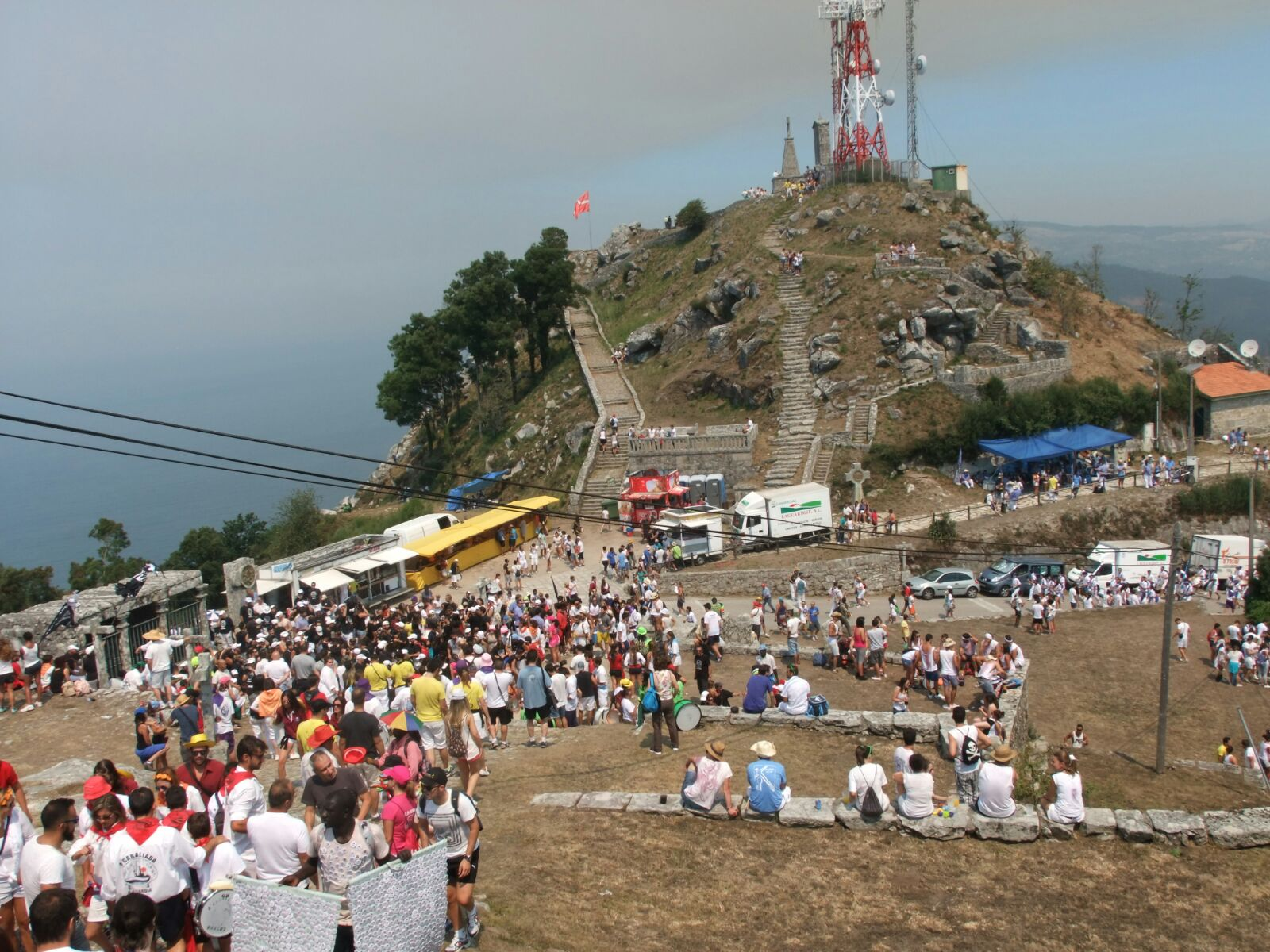 Día más importante de la fiesta, el domingo en sus inicios.